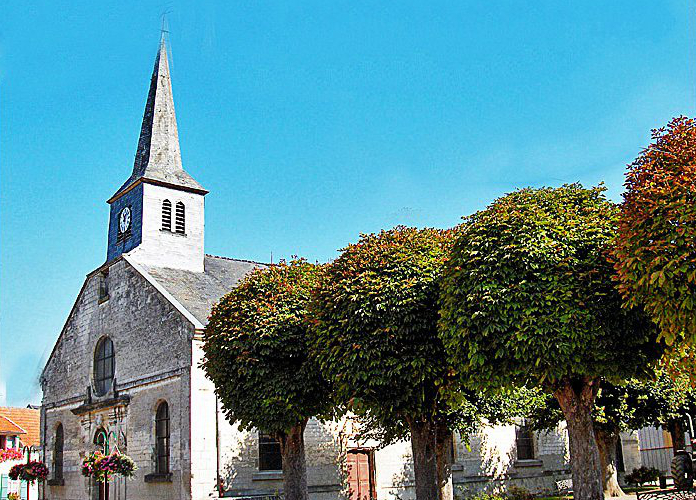 Avaux, église Notre-Dame, vue de la place